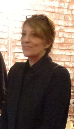 Photo profil de Mylena Atanassova, prise pendant le concour art et média "Réseaux proactive".